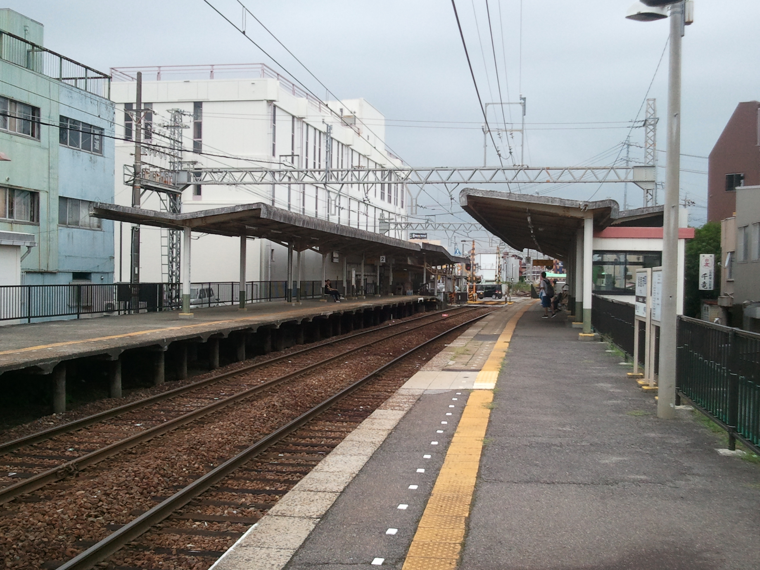 鈴鹿市駅プラットホーム